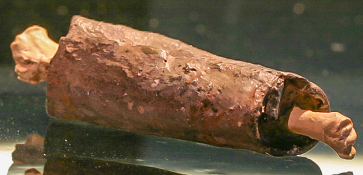 Fluchtäfelchen im originalen Fundzustand um einen Hühnerknochen gerollt.